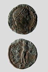 Moneta rinvenuta nel 1986 durante sondaggio archeologico presso la Chiesa di S.Antonino (Svizzera)